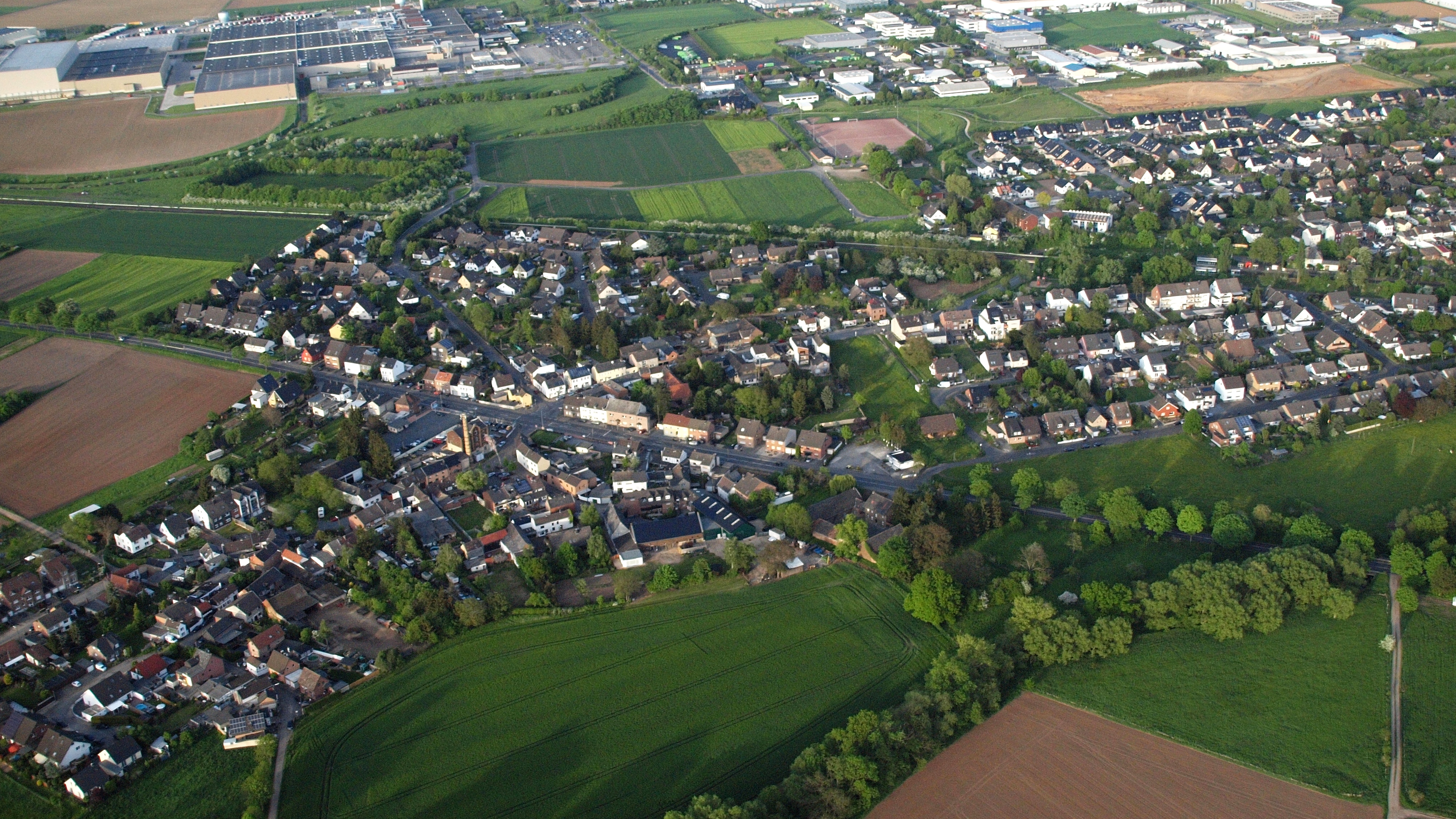 Wüschheim (Euskirchen)